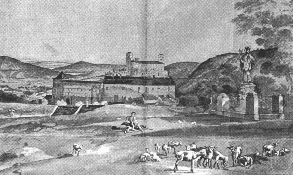 Račice u Vyškova